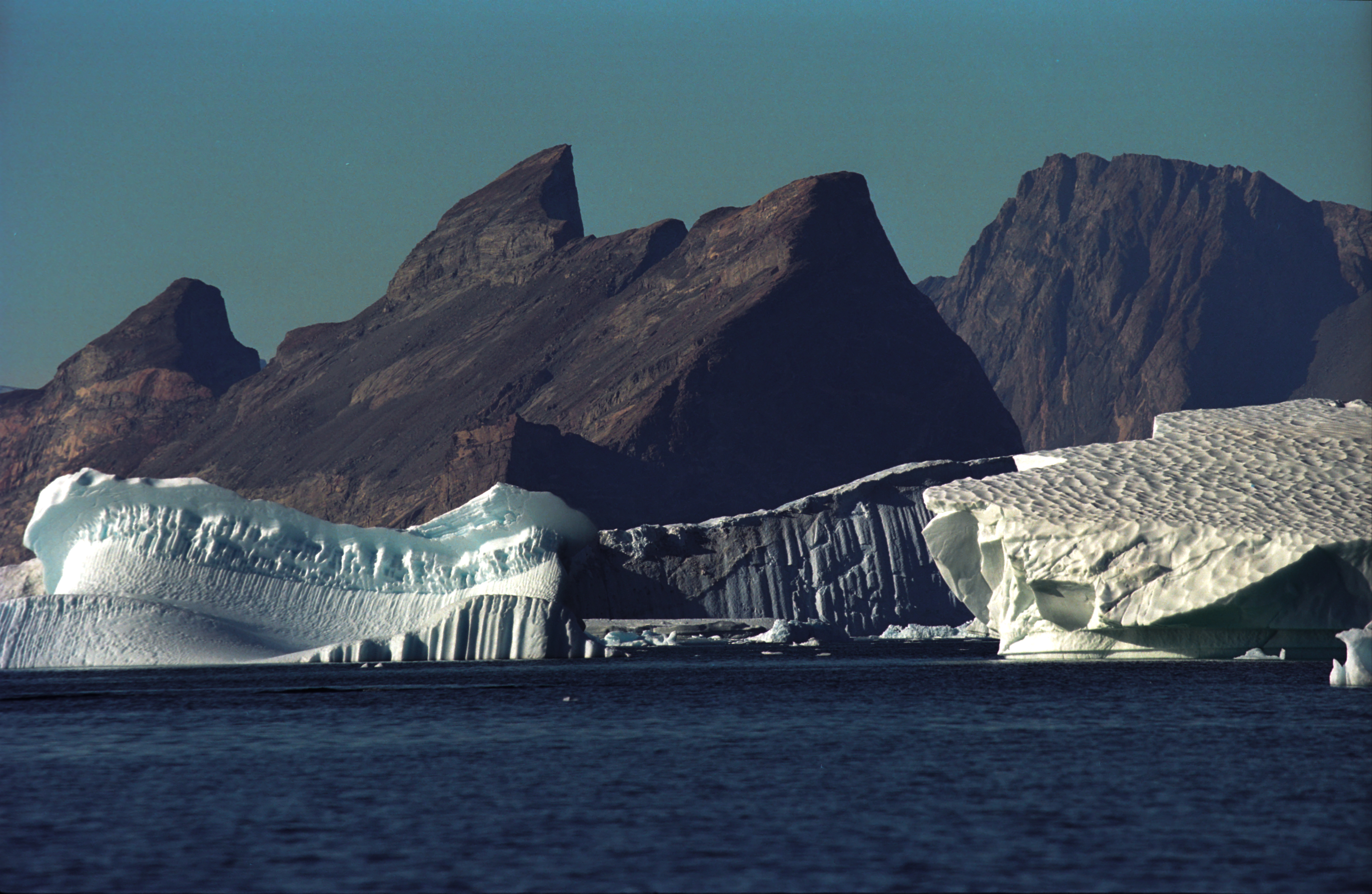 Wśród lodów grenlandzkich fiordów